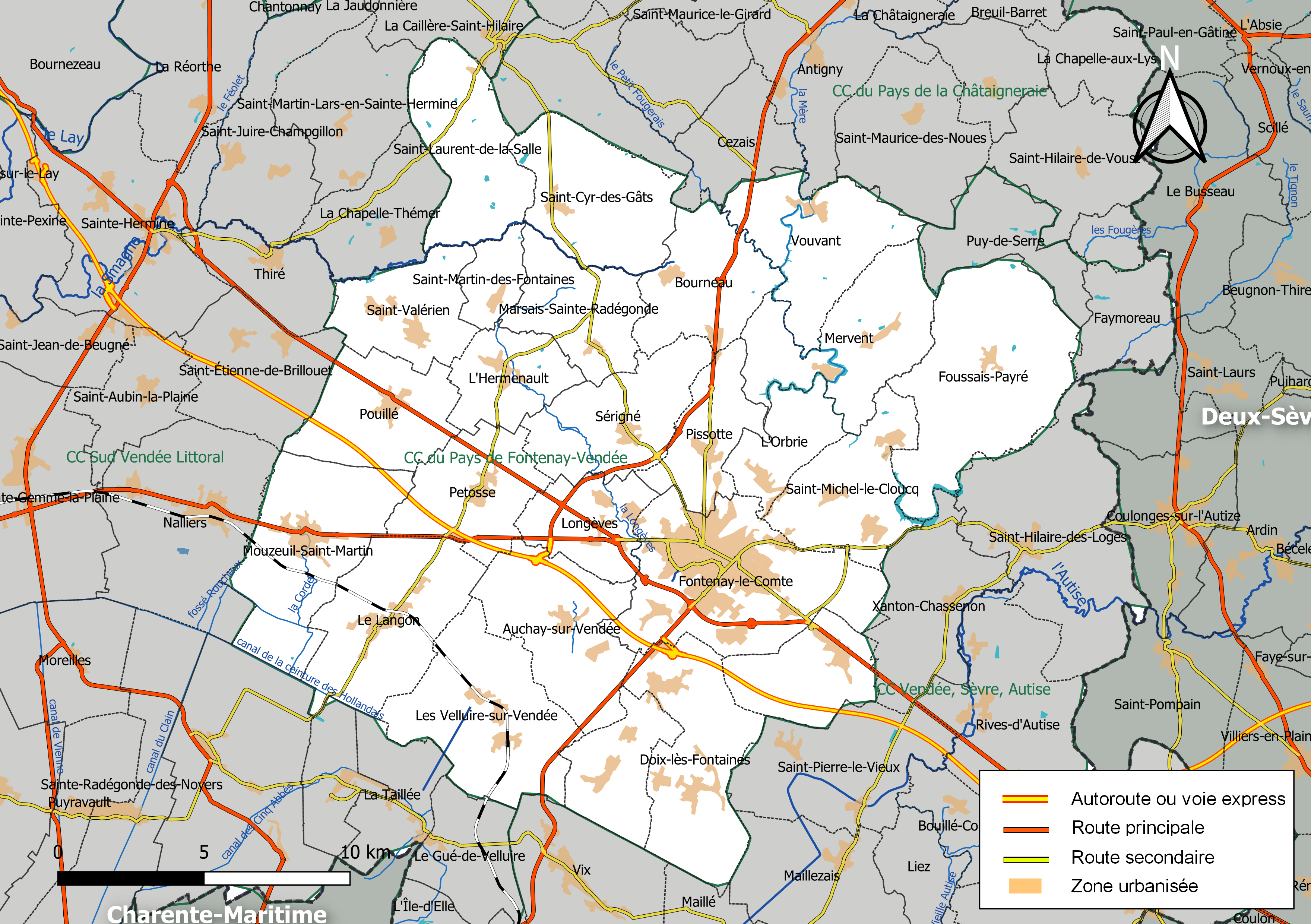 Carte géographique de l'intercommunalité Pays-de-Fontenay-Vendée, département de la Vendée, France. Composition au 1er janvier 2019.